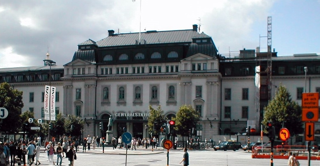 Hauptbahnhof Stockholm Frontansicht.